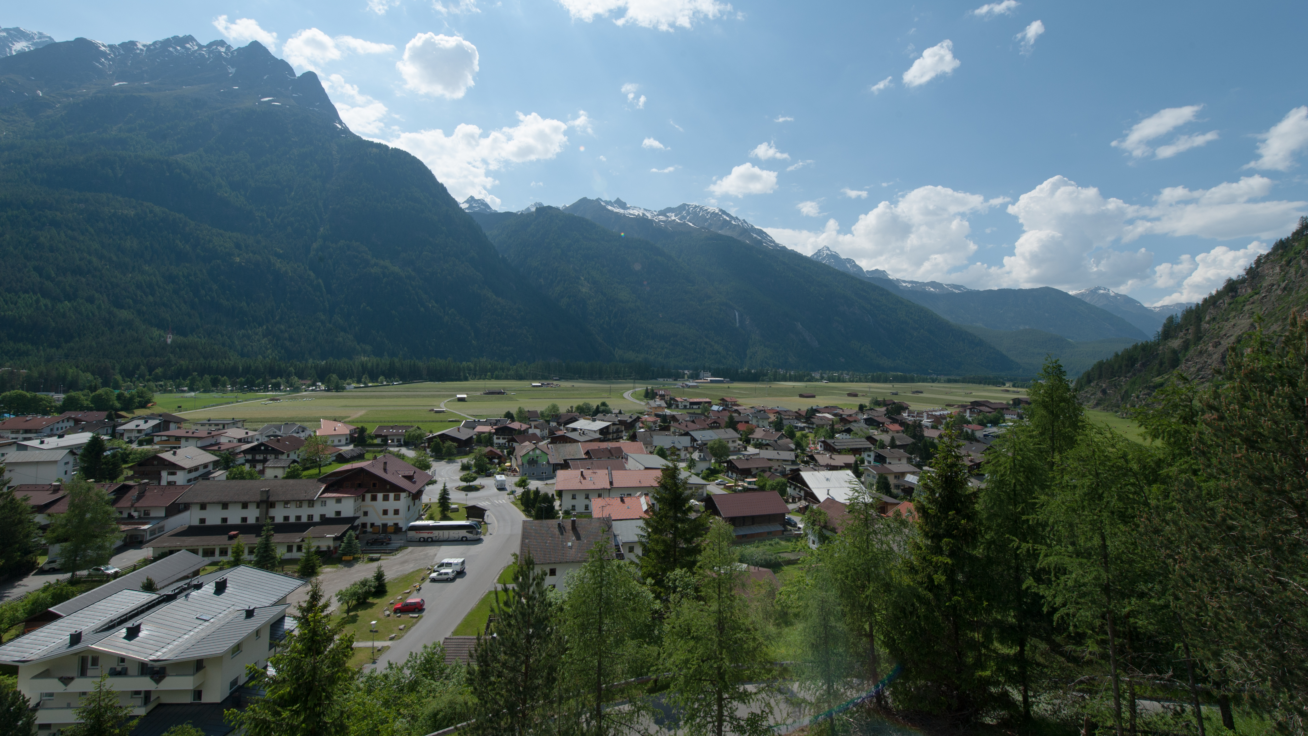 Wiki takes Nordtiroler Oberland: Längenfeld